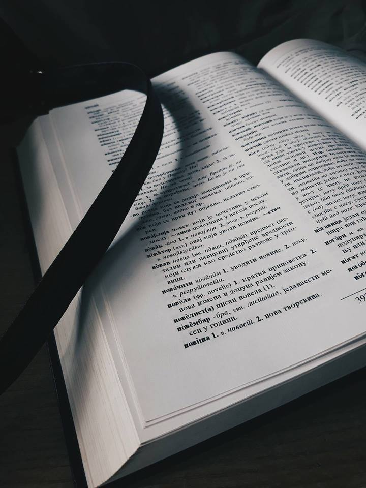 Ријечник српског језика